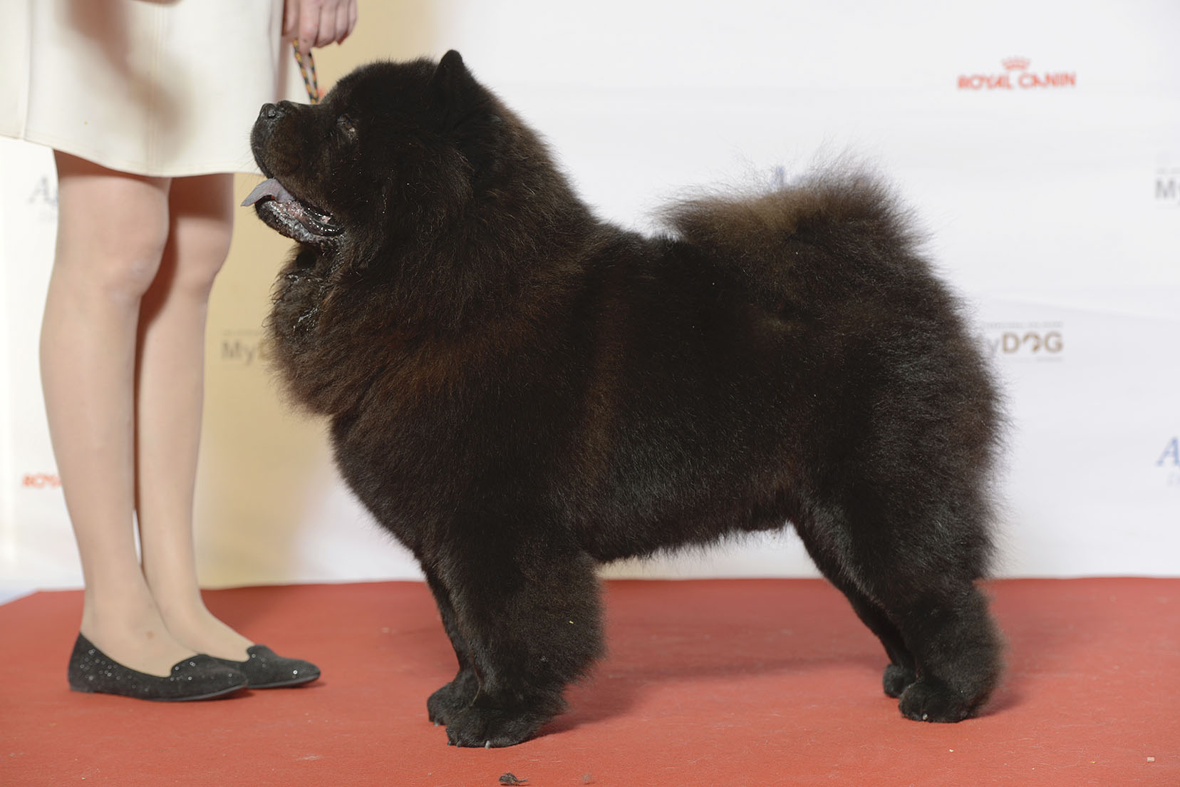 BIR Grupp 5 CHOW CHOW C.I.B. DK UCH DI UCH NO UCH NO V-14 V-15 NORD UCH SE UCH SE V-13 SE V-14 -15 MyDOG, Nordens största hundevenemang